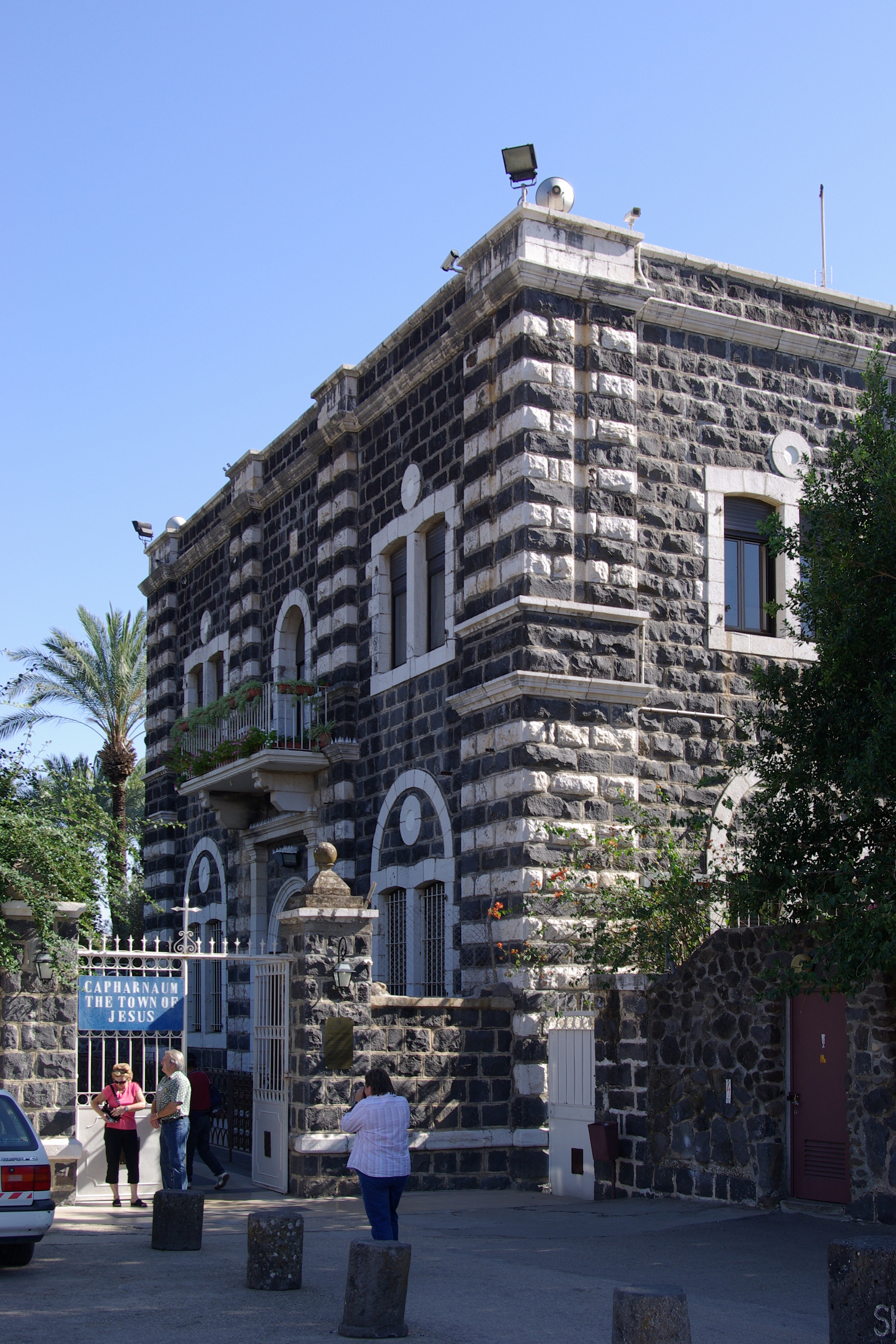 Kafarnaum